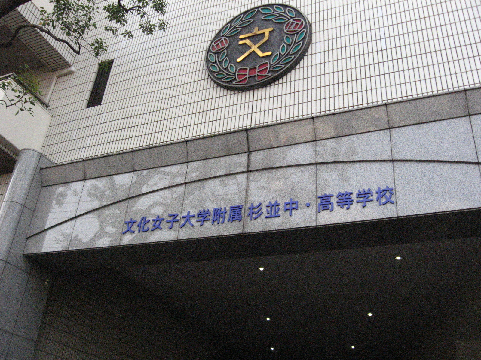 文化女子大学附属杉並中・高等学校